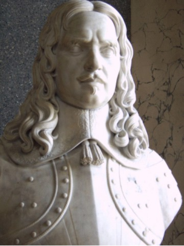 buste de la galerie des batailles du château de Versailles